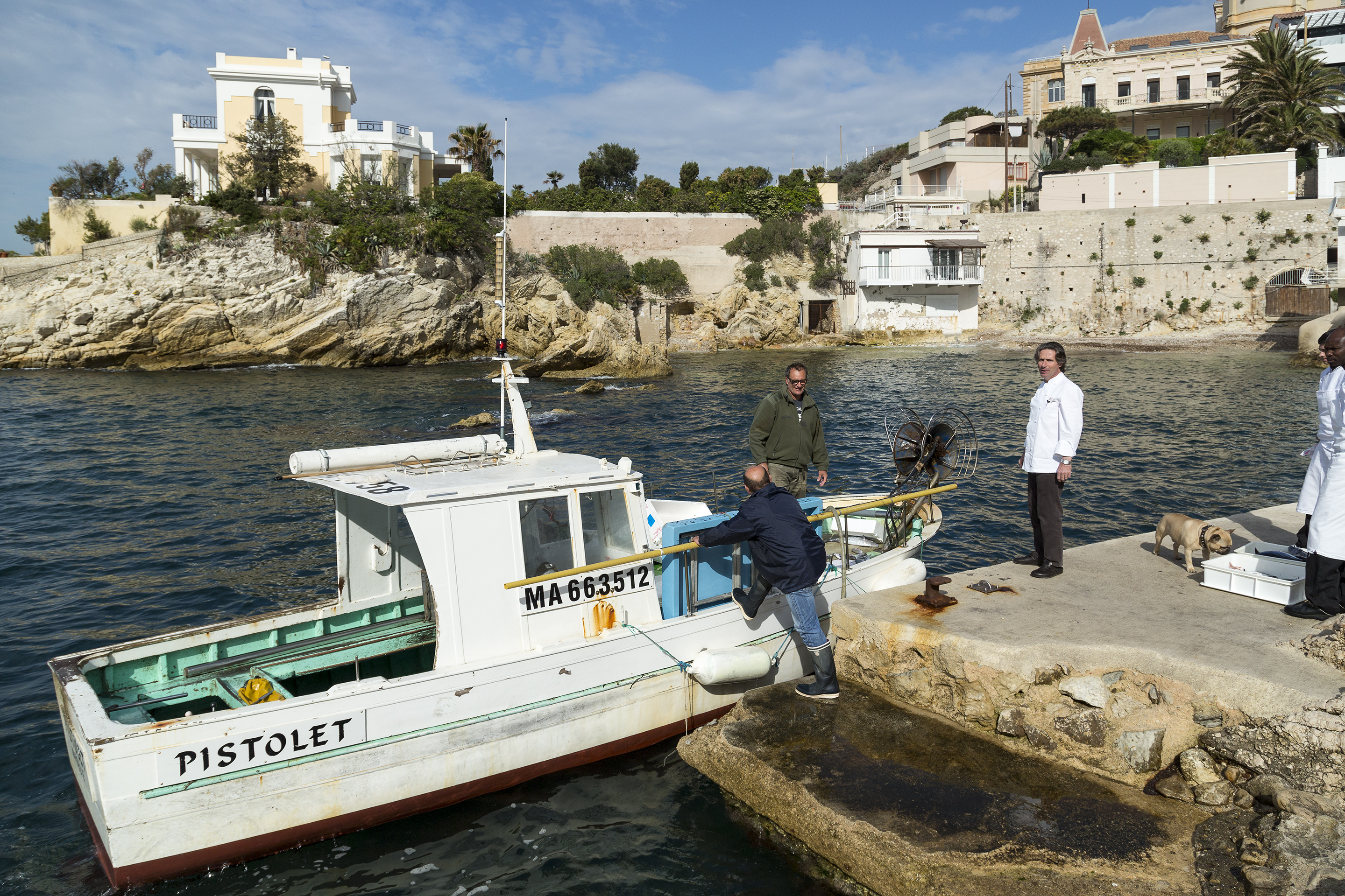 Les pêcheurs du port de Marseille livrent leur pêche du jour à Gérald Passedat